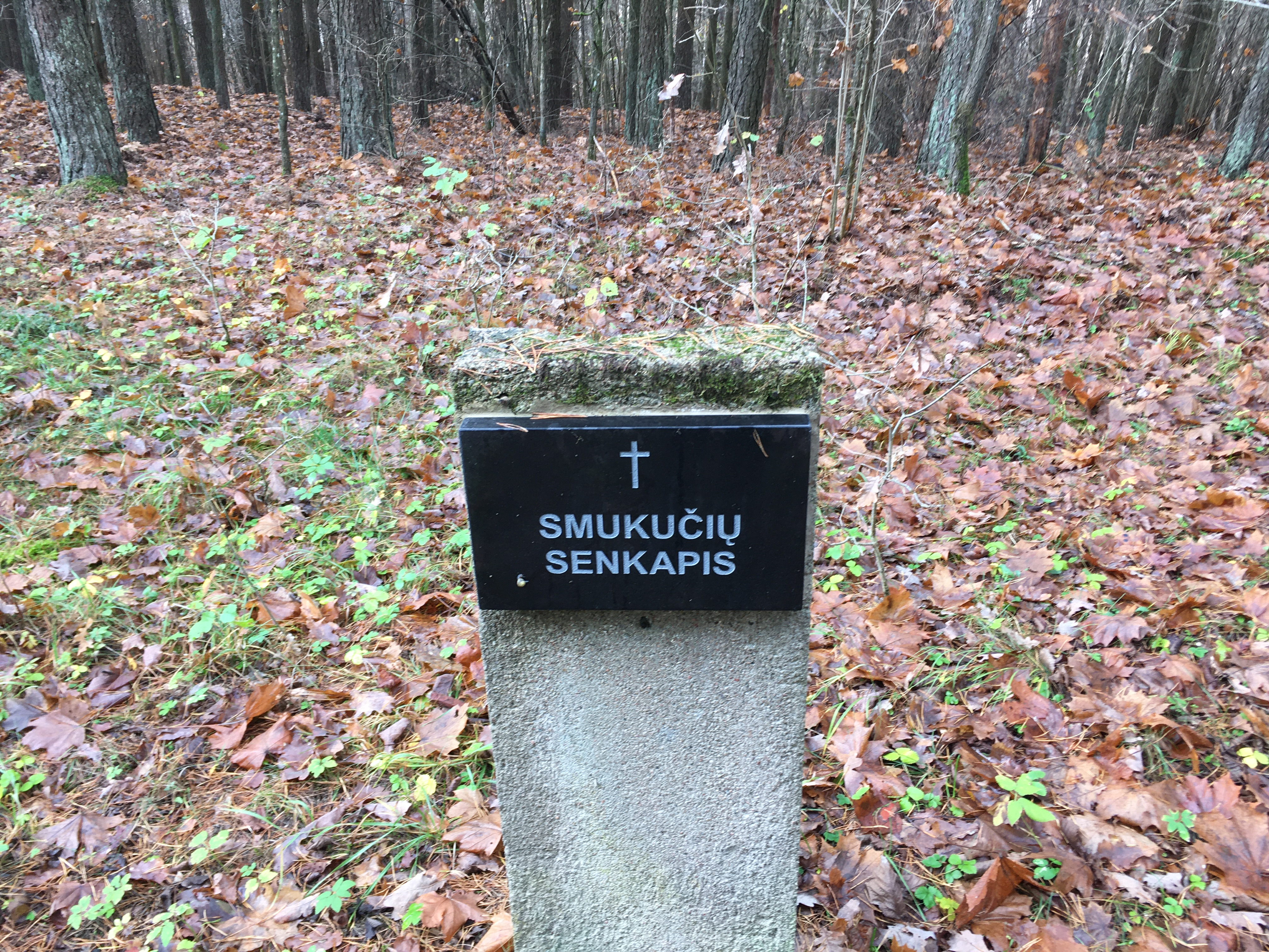 Smukučių senkapio ženklas